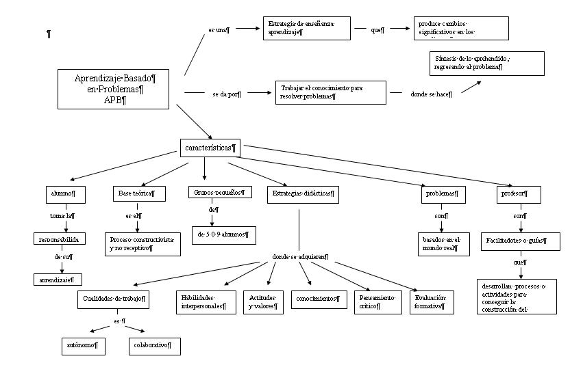 mapa conceptual del Aprendizaje Basado en Problemas metodo de aprendizaje-enseñanza